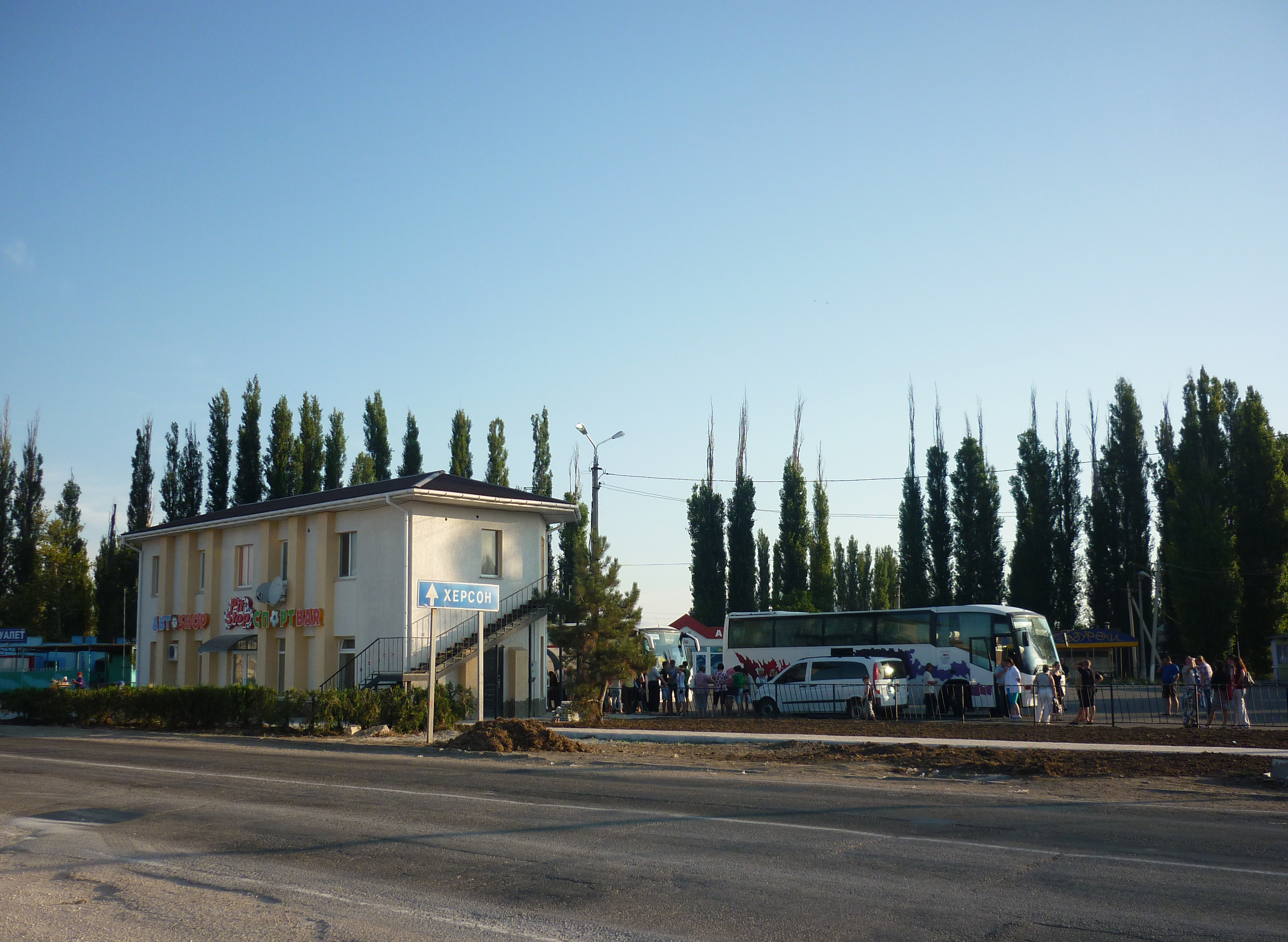 Автостанція в місті Армянську в Криму